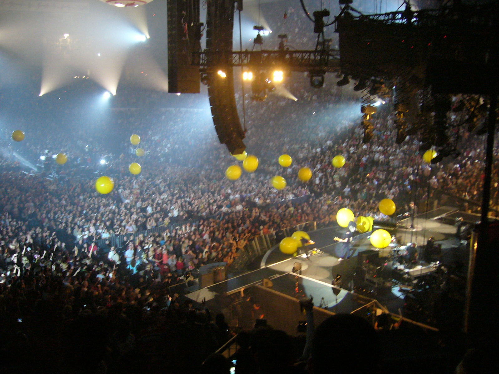 Single Yellow de Coldplay, tocado en vivo